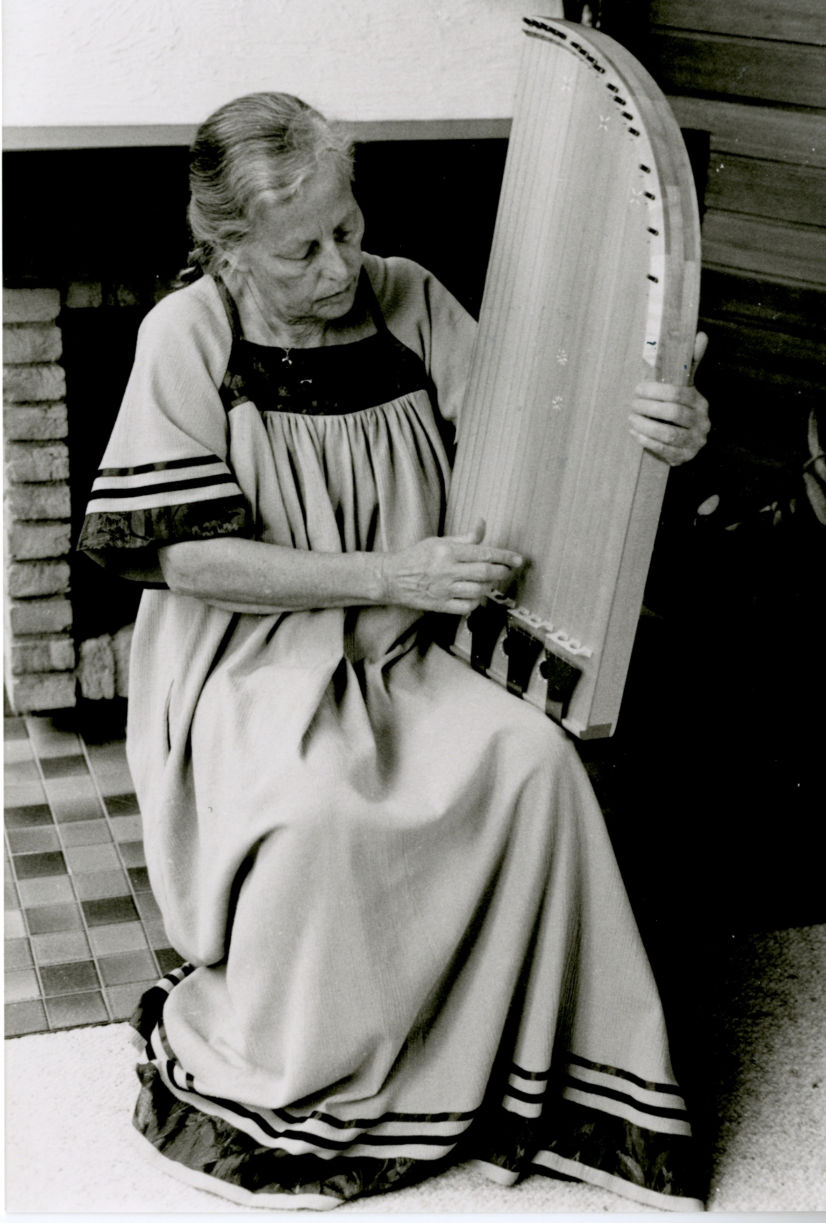 Nelly van Ree, musicòloga i constructora d'instruments antics